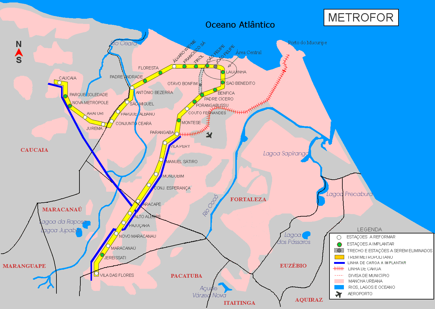 sistema de metrô da Região metropolitana de fortaleza